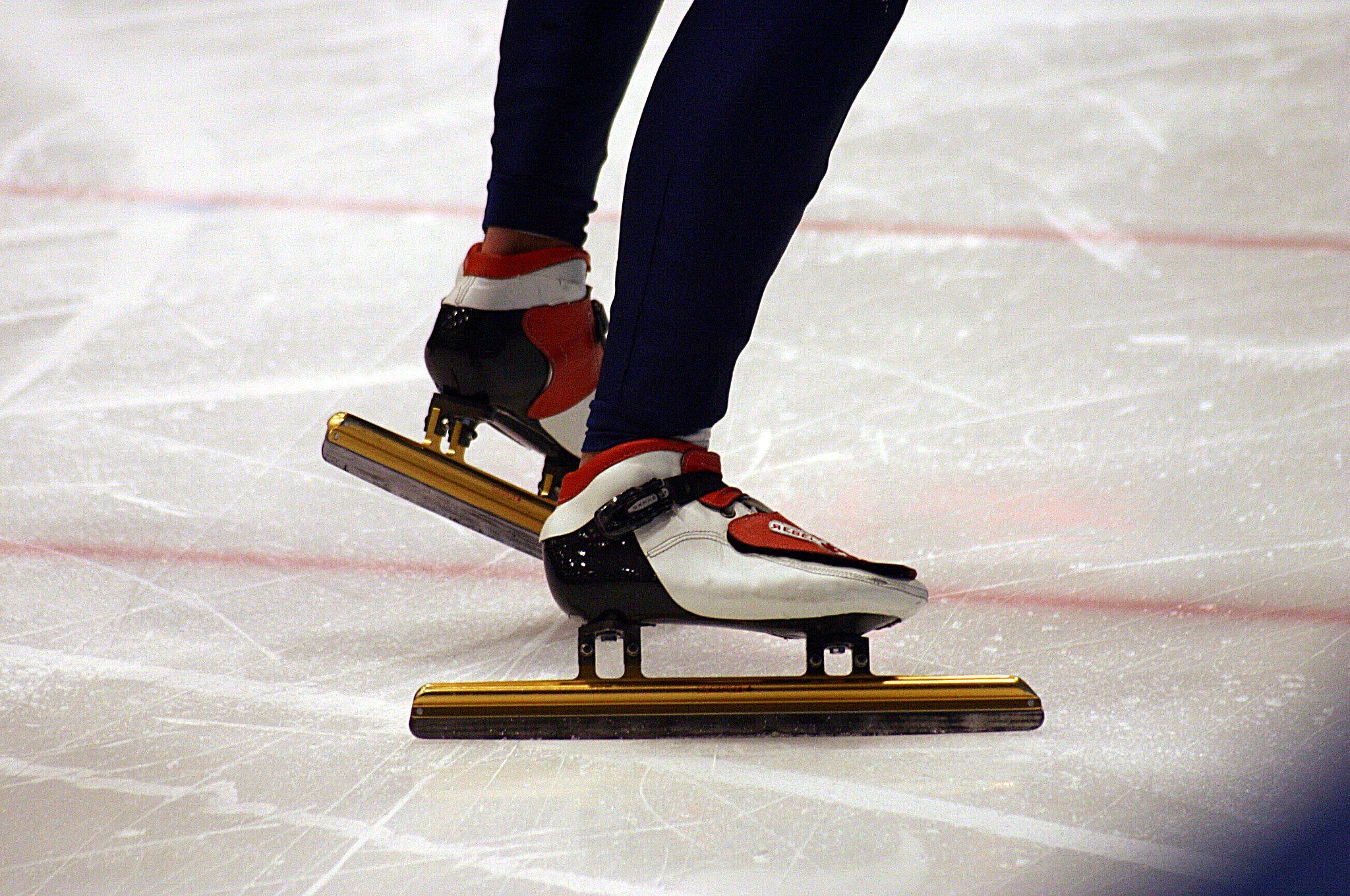 A skate as used in short track speed skating